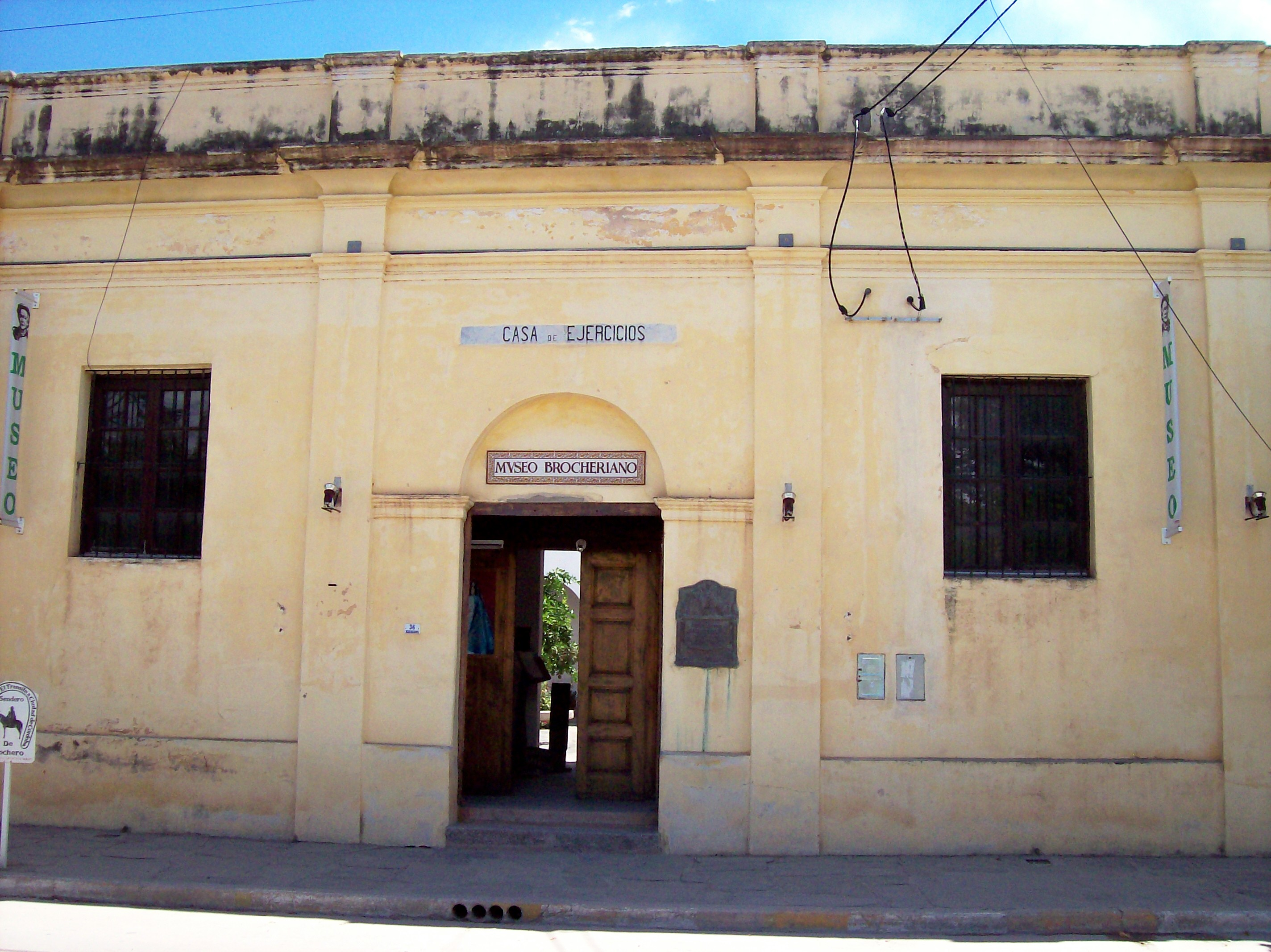 Entrada al Museo Brocheriano, en la ciudad de Villa Cura Brochero.